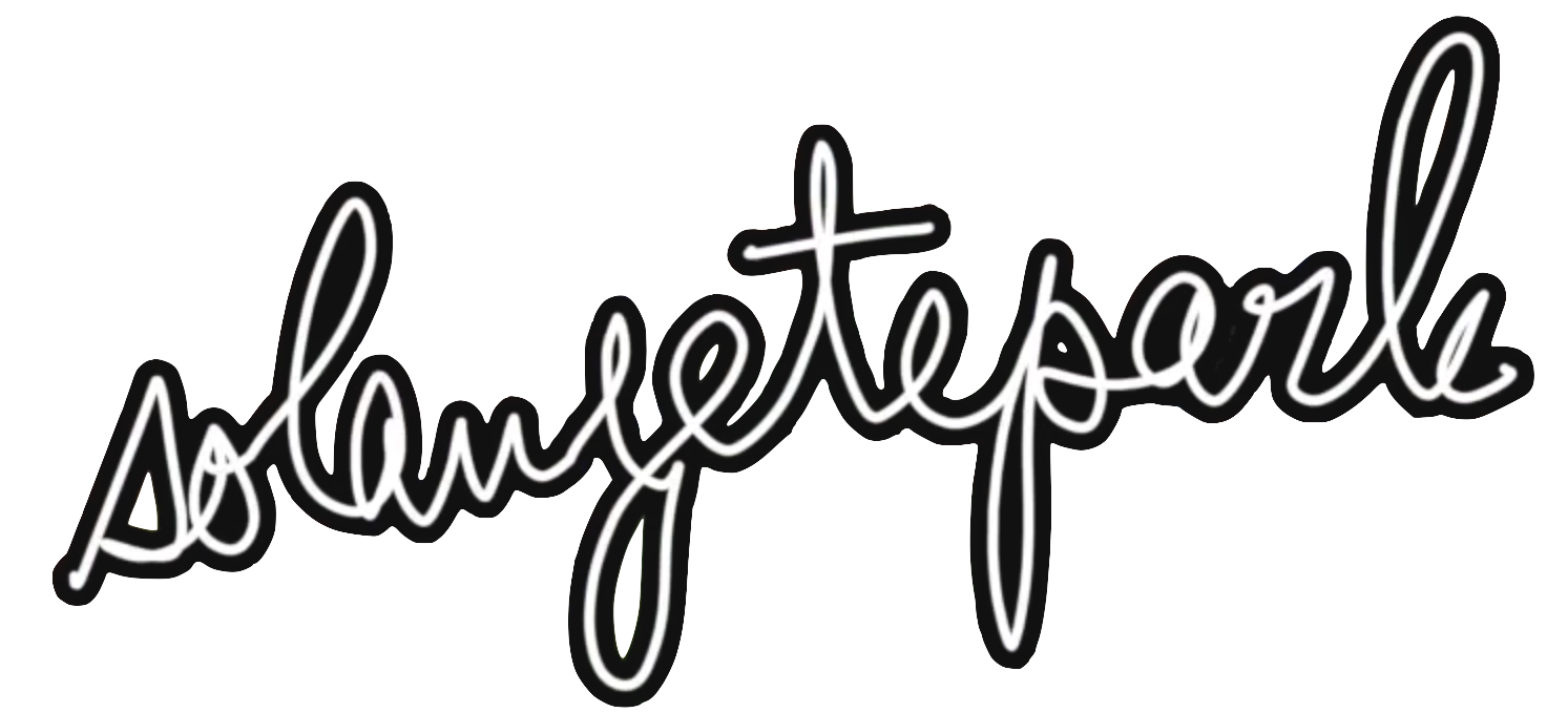 Logo de l'émission SolangeTeParle